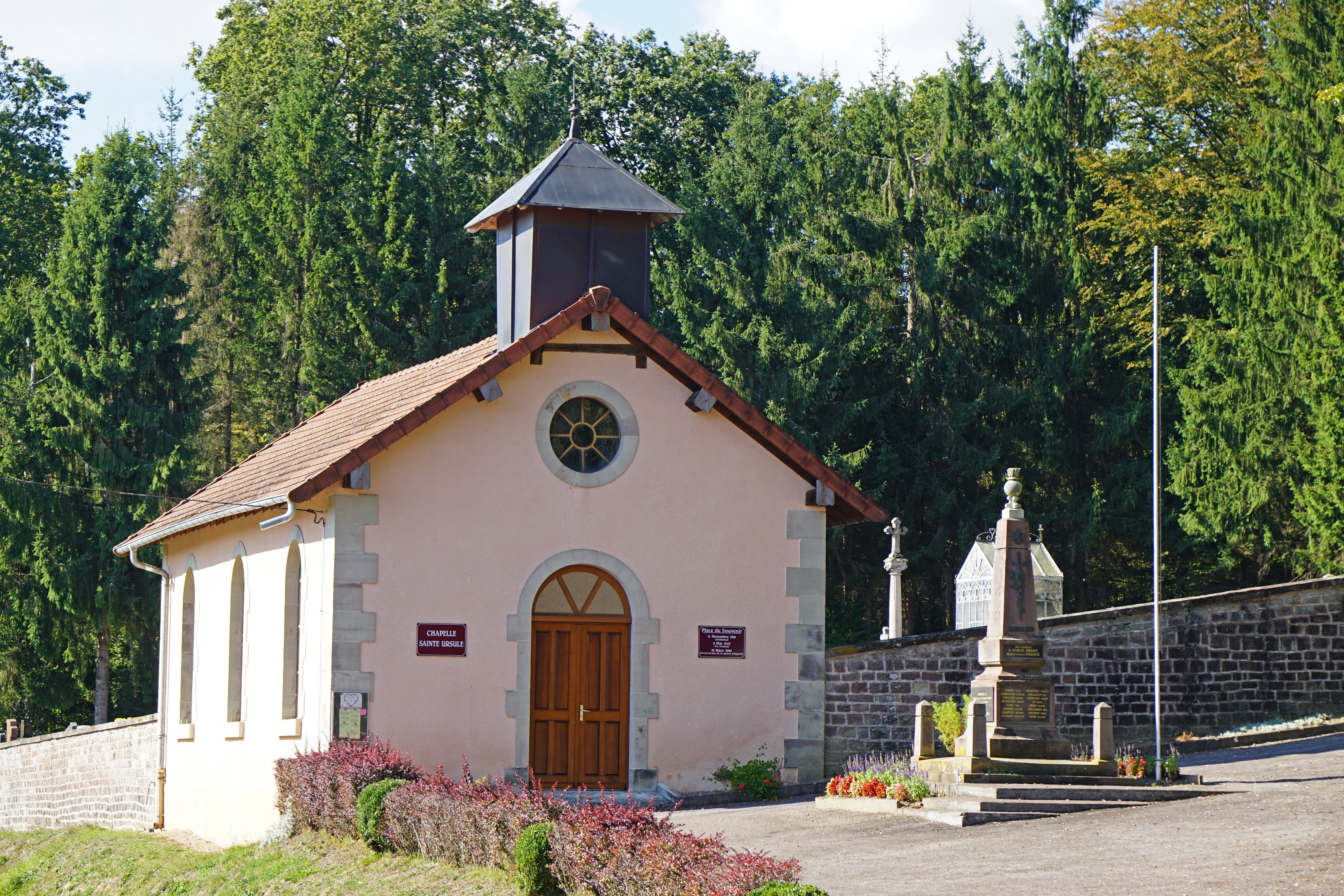 La chapelle Sainte-Ursule d'Esboz-Brest et le monument aux morts à droite.